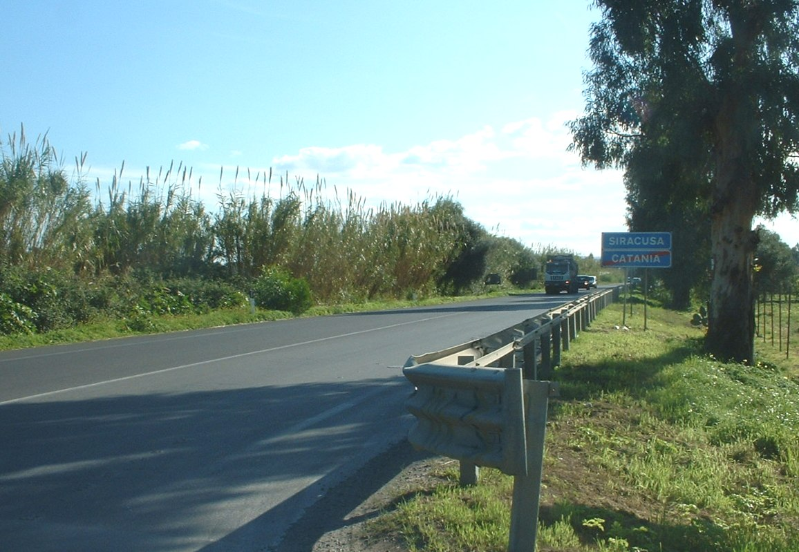 L'inizio del tratto siracusano della Strada Statale 114